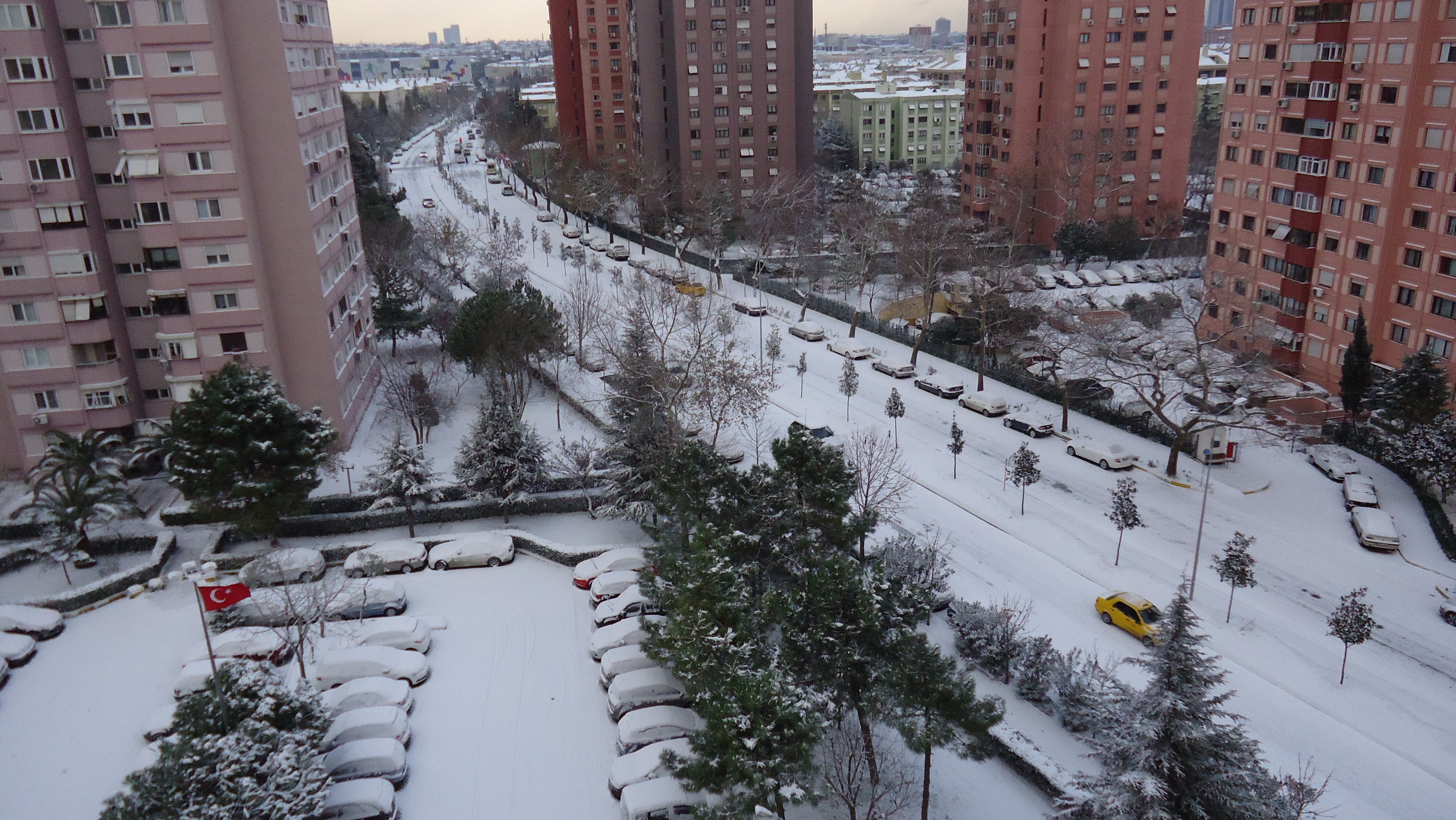 Ataköy 2013 oCAK